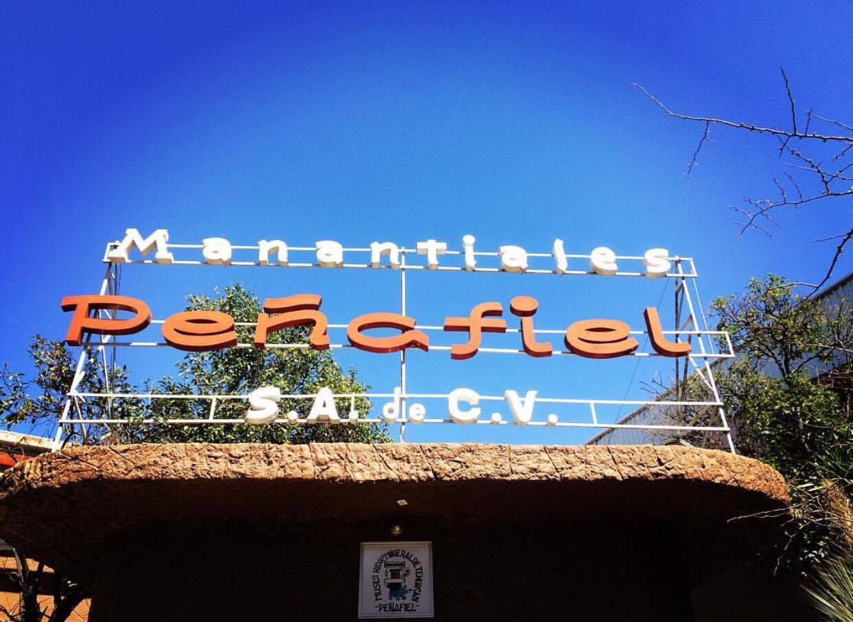 Manantiales Peñafiel